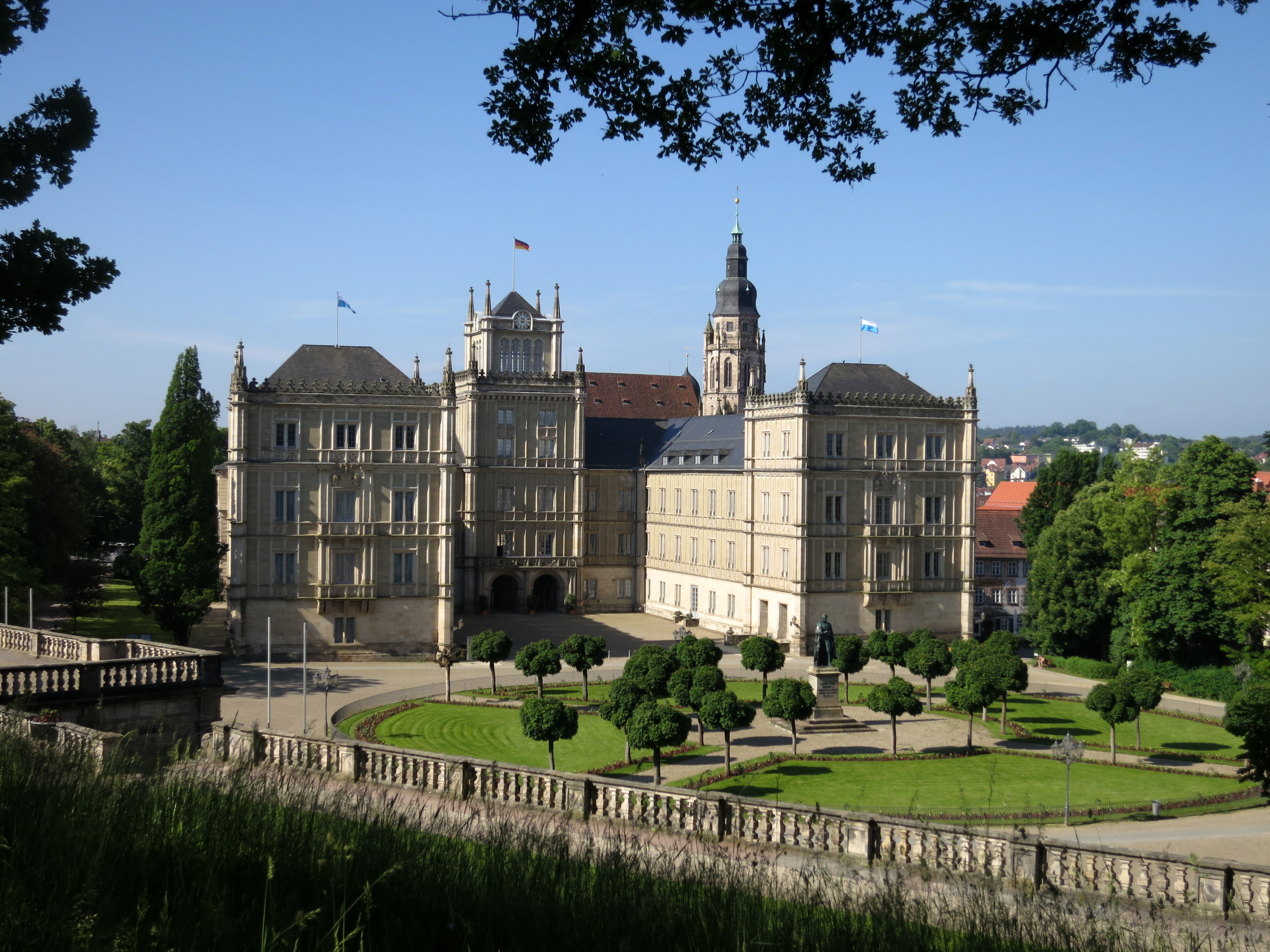 Schloss Ehrenburg vom Hofgarten aus gesehen